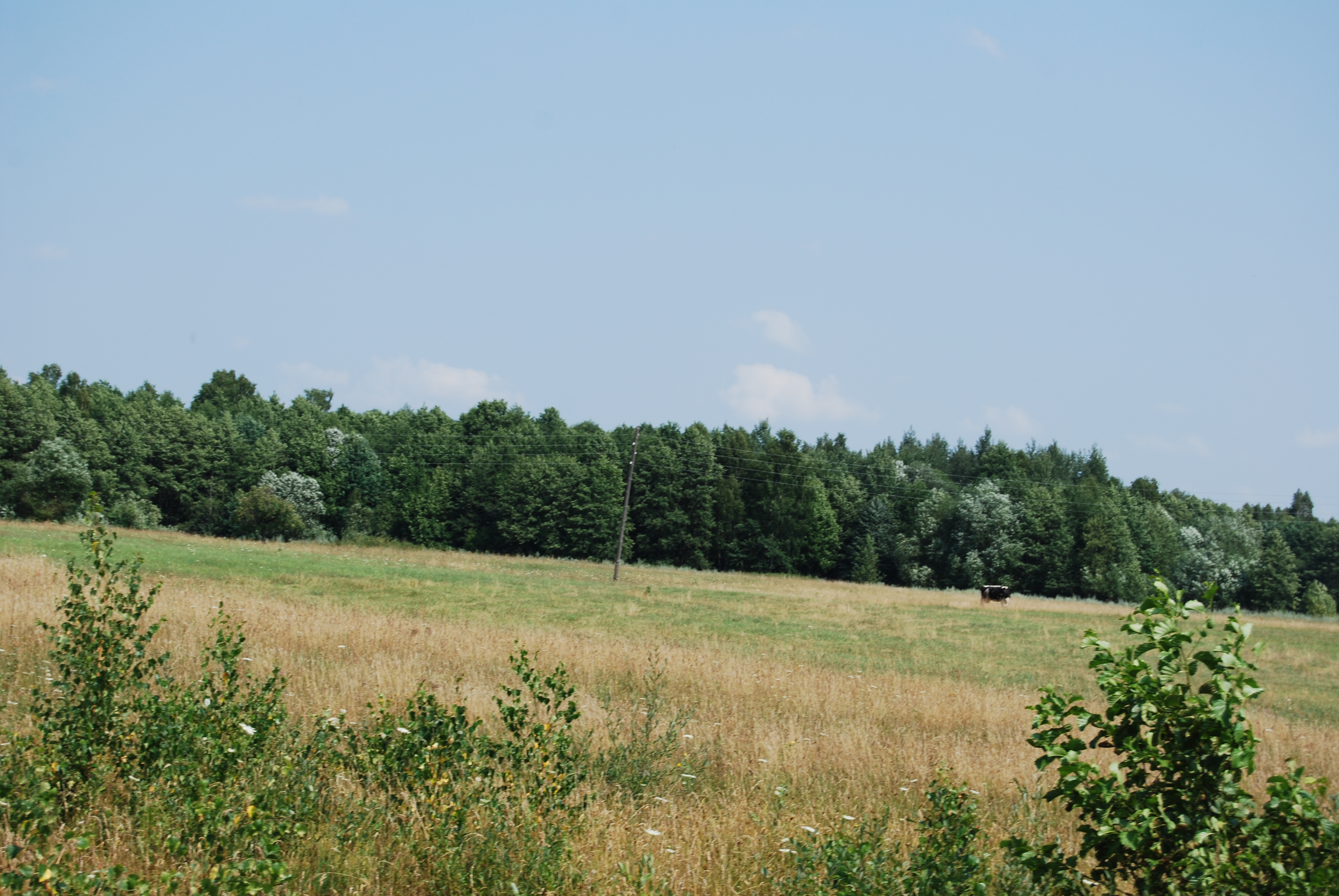 Widok od strony Wyrki na las porastający tereny kolonii Użanie i Perespa.